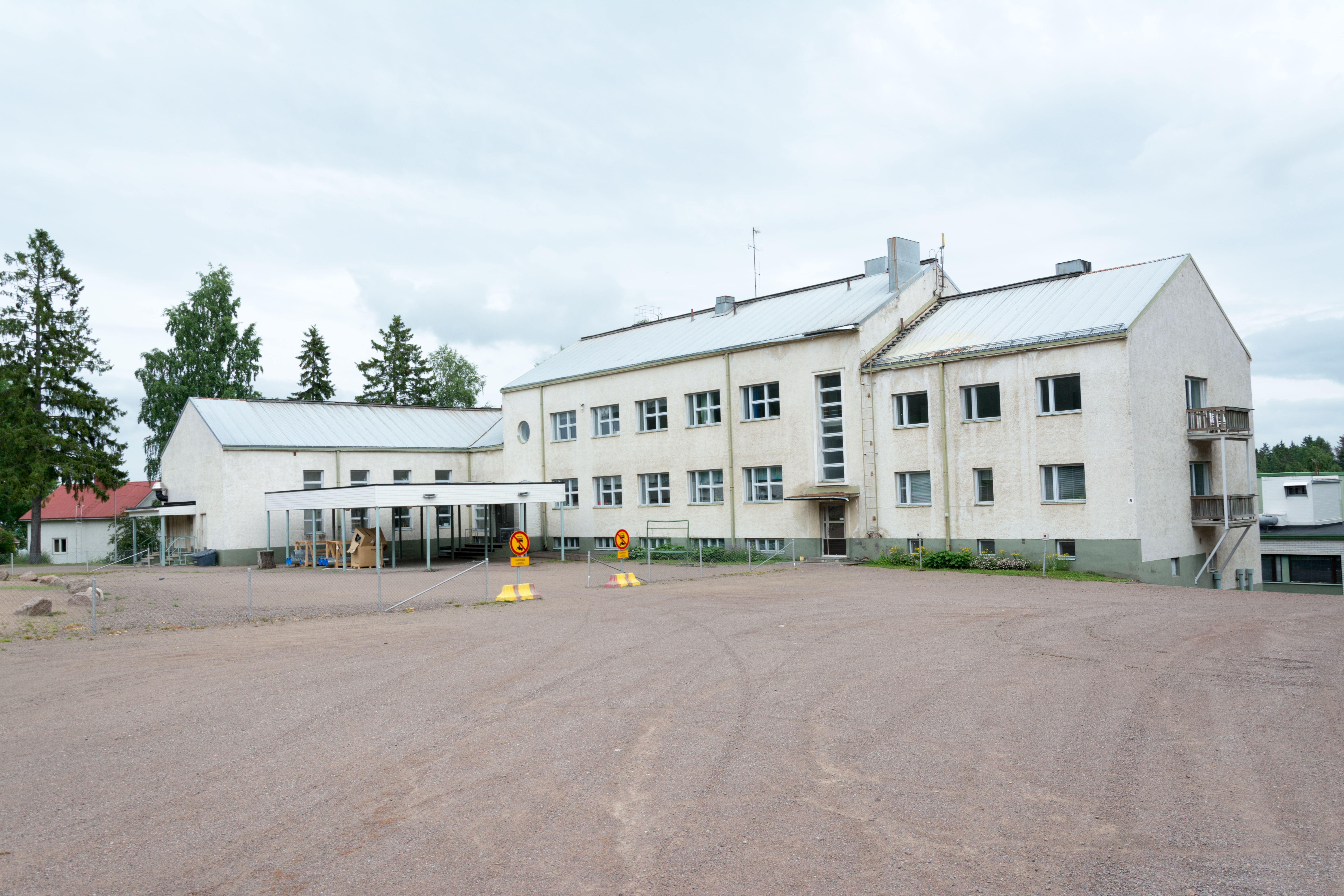 Anjalan koulu Kouvolassa